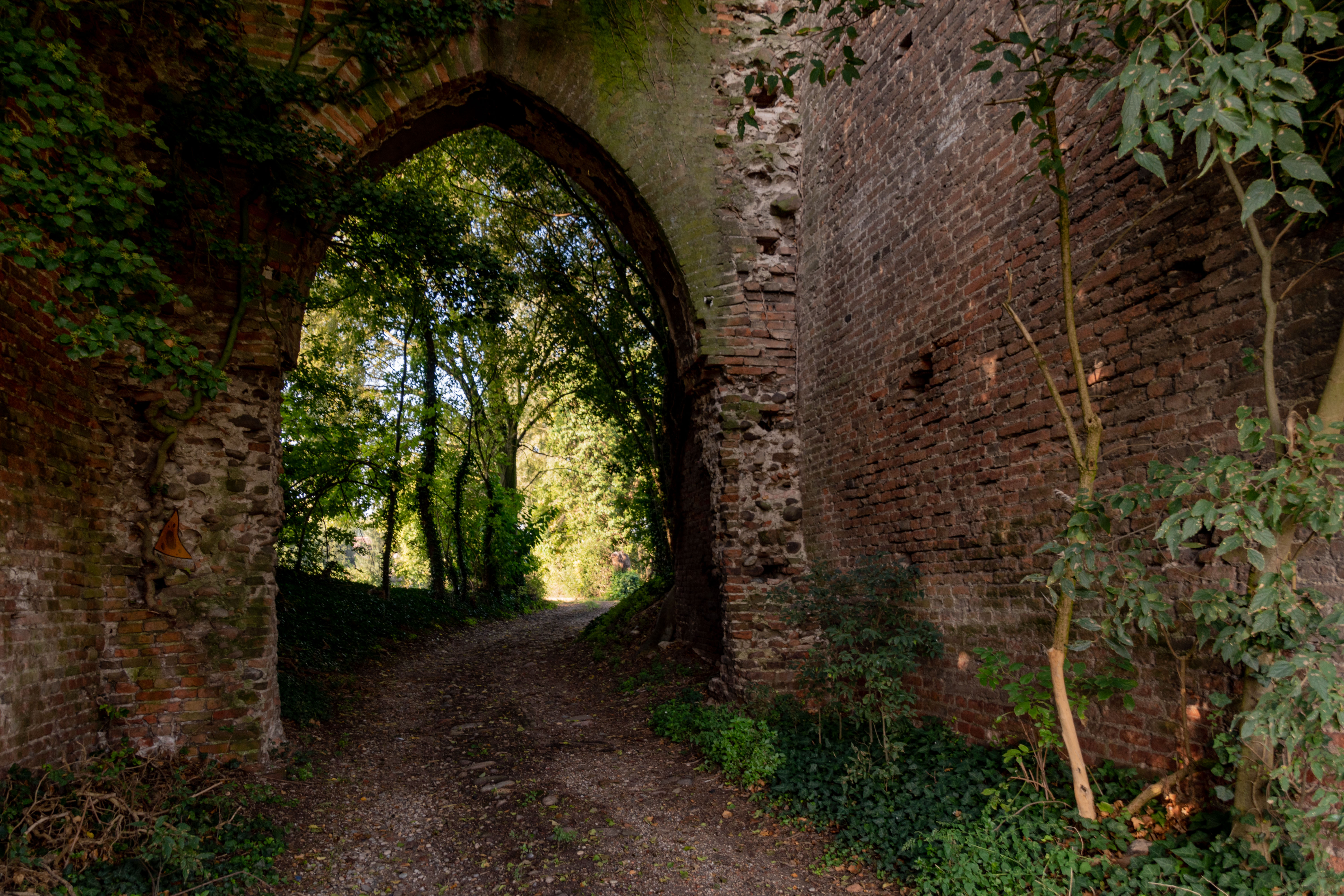 Porta est a sesto acuto verso l'interno del castello